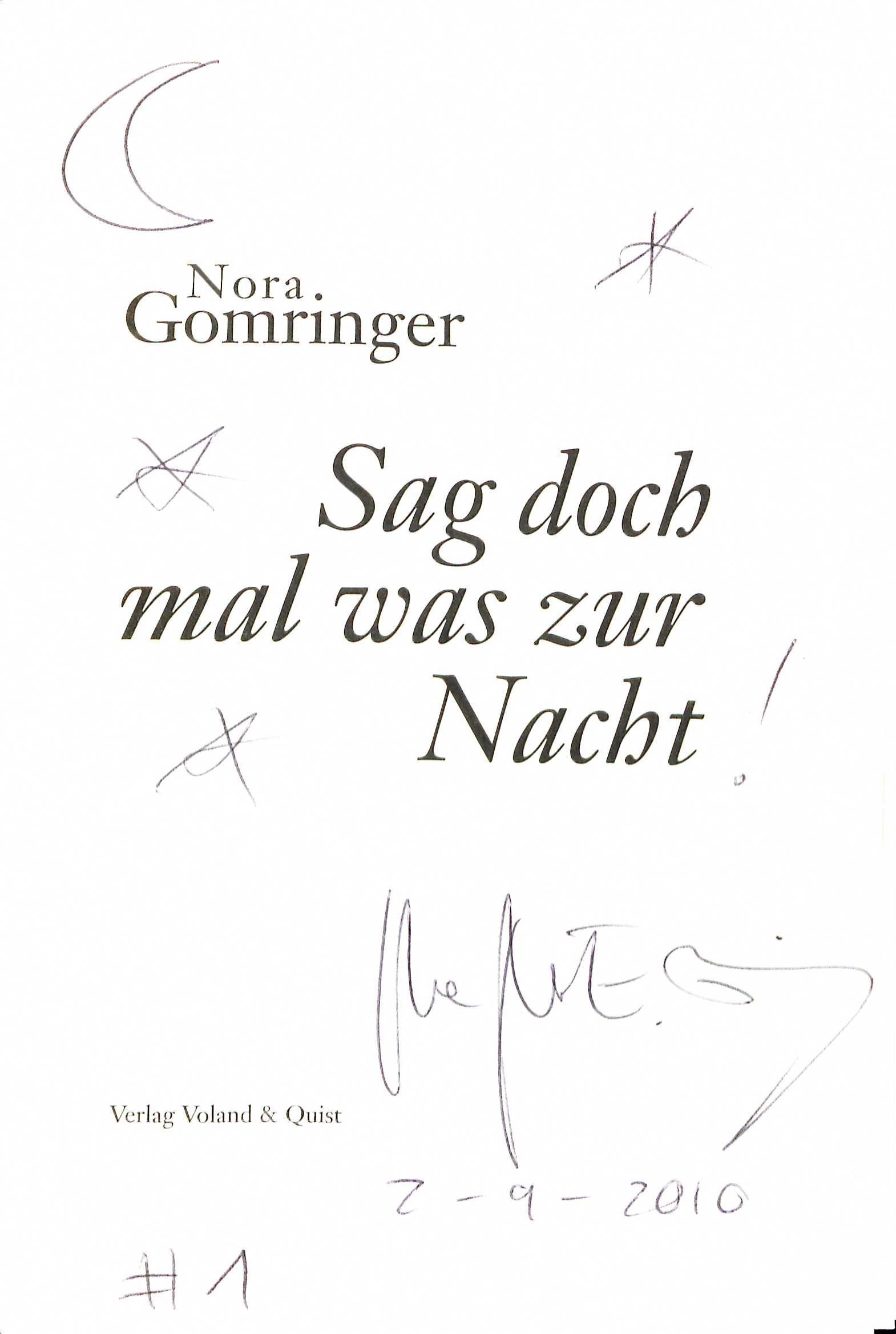 Nora Gomringer: Sag doch mal was zur Nacht, 2006, Unterschrift 2. September 2010